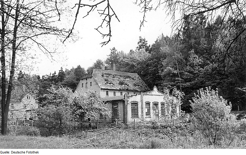 Original image description from the Deutsche Fotothek Berthelsdorf-Rennersdorf. Ehem. Wollspinnfabrik zwischen Rennersdorf und Kunnersdorf, unweit der Spinnerei